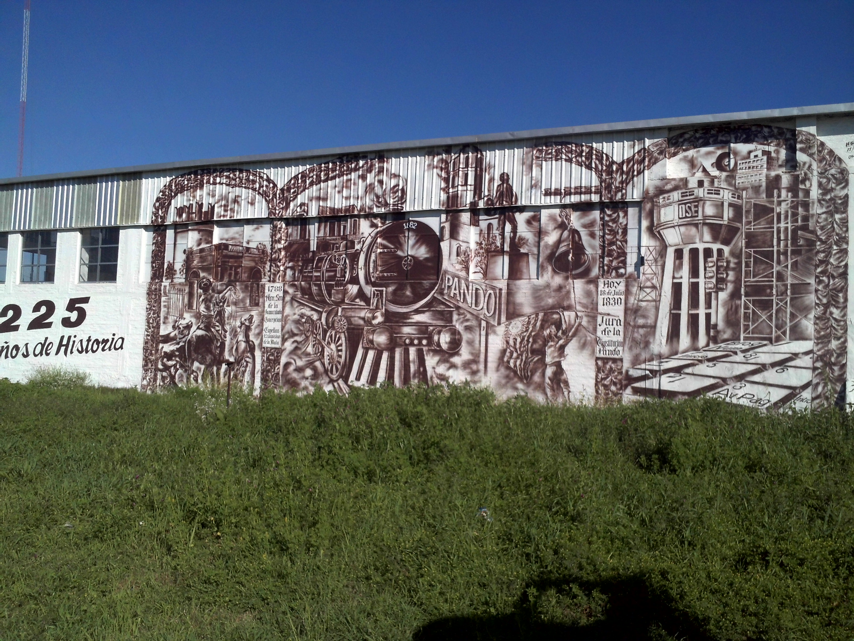 Pintura realizada por H. García sobre evolución histórica de Pando (Uruguay ) declarado patrimonio histórico nacional